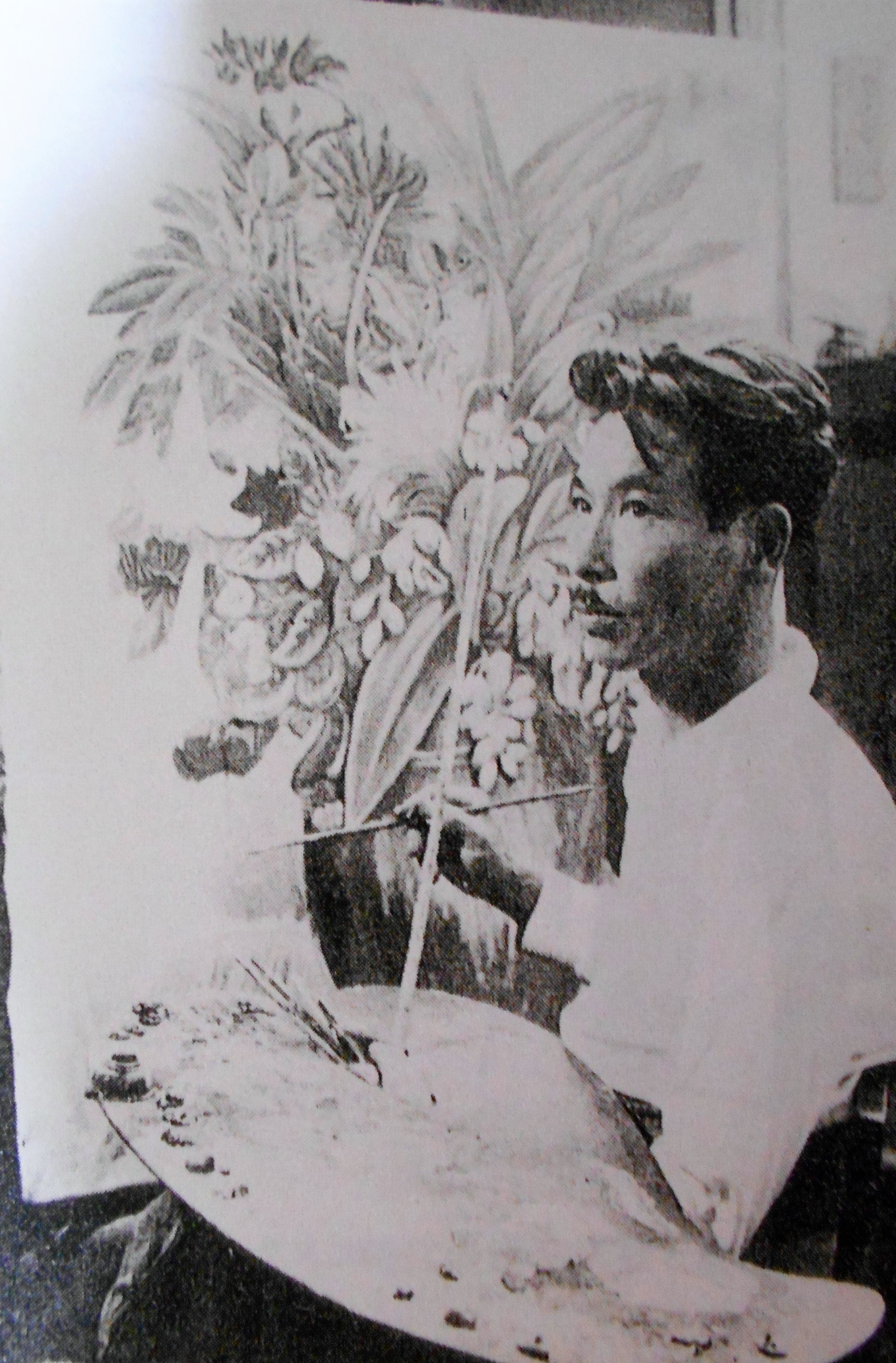 『南国の花』を製作中の北川民次。